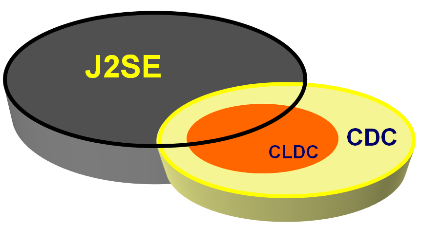 Množiny funkcí Java platformem